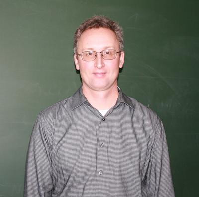 Foto di Dmitry Kramkov